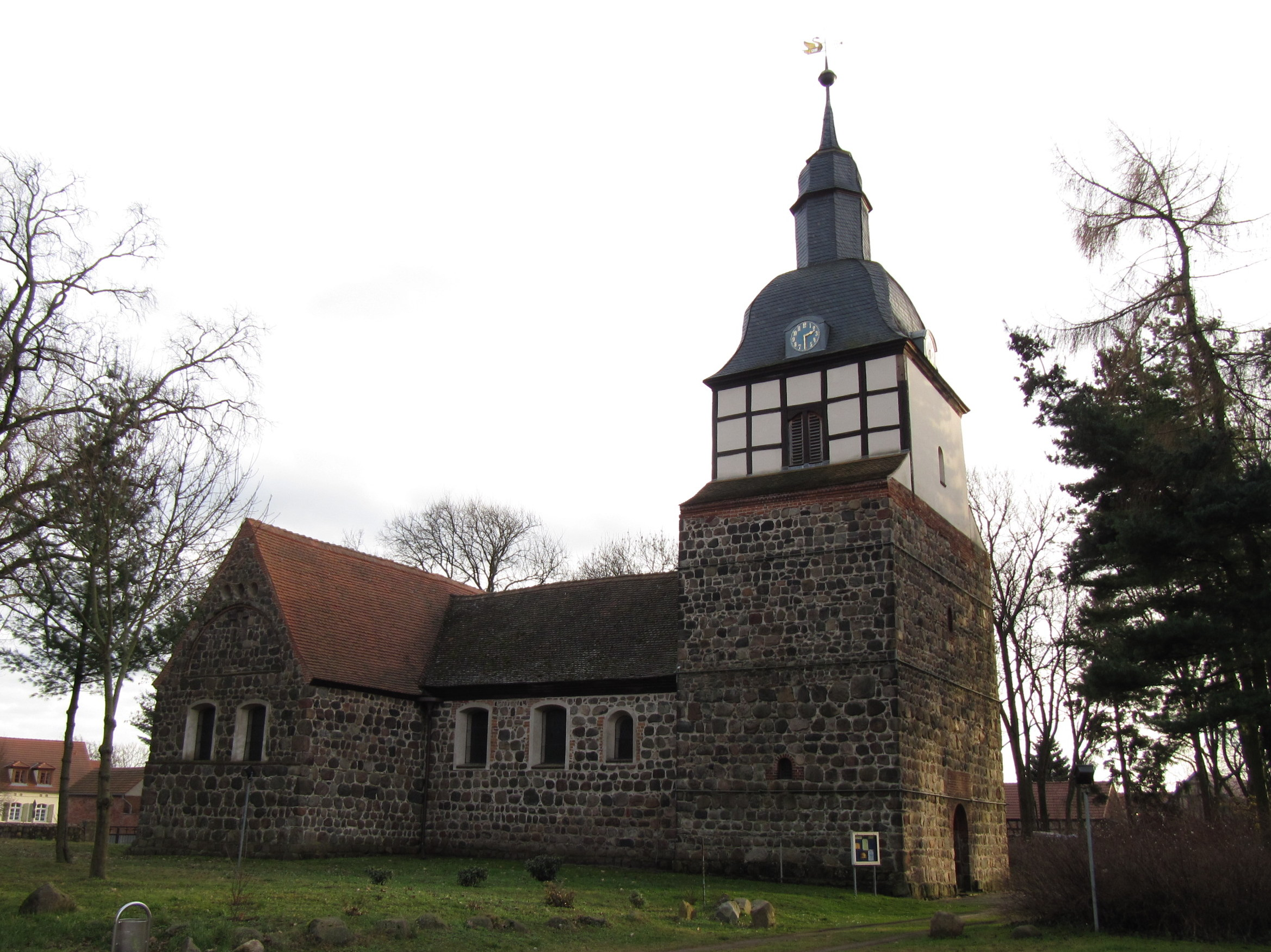 Kirche Wusterwitz von Nordwest